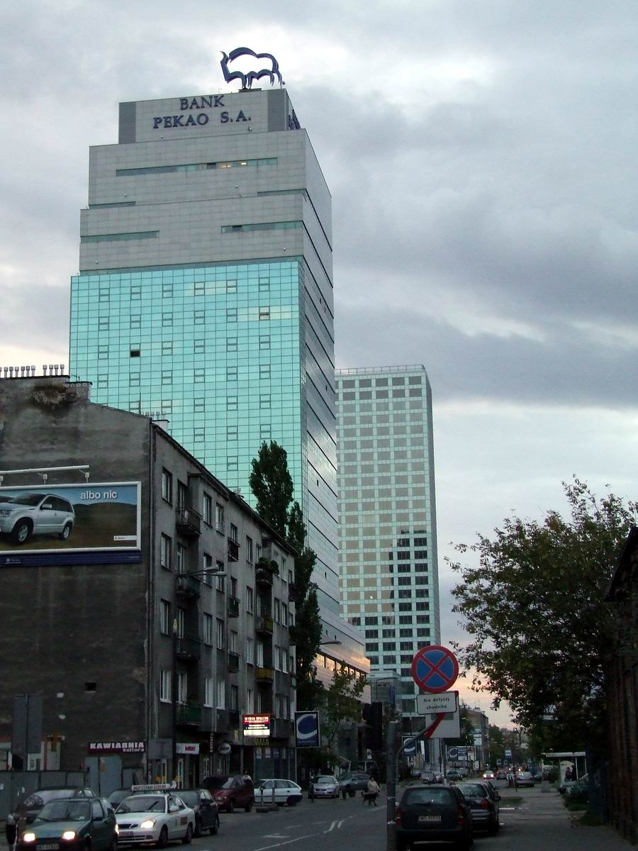 Pekao Tower, Warsaw